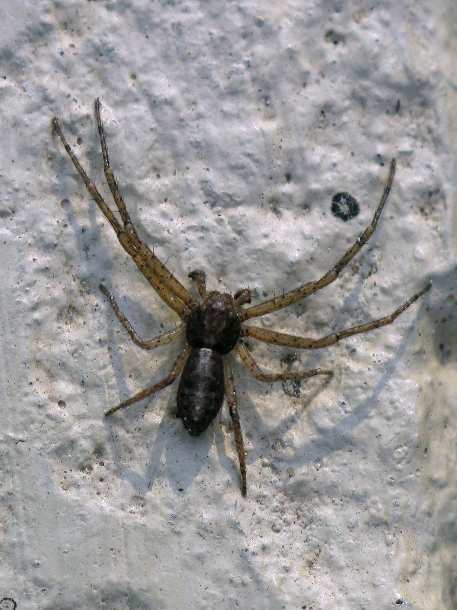 Tmarus piger, araña en Vilarromarís, Oroso, Galiza, España